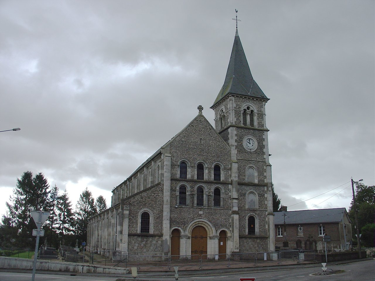 Chiesa di Berville